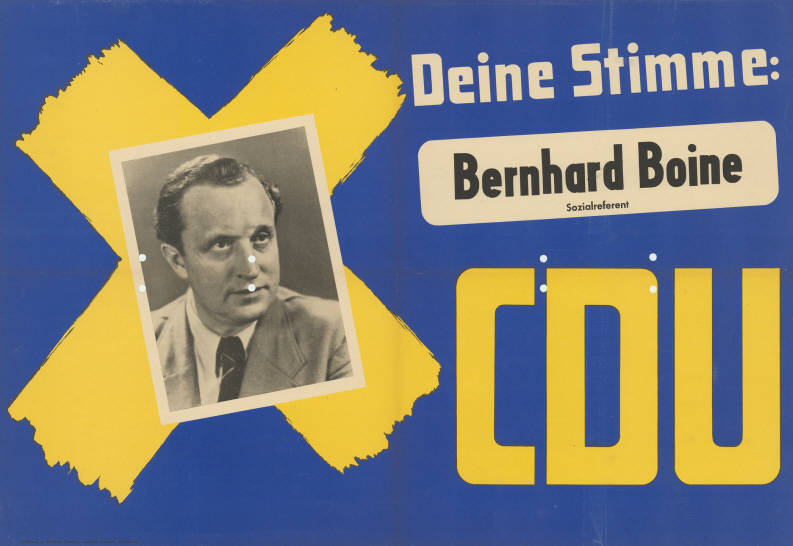 Deine Stimme: Bernhard Boine Sozialreferent CDU Abbildung: Porträtfoto - Stimmkreuz Plakatart: Kandidaten-/Personenplakat mit Porträt Drucker_Druckart_Druckort: Bilddruck u. Klischee Lambert Lensing G.m.b.H., Dortmund Objekt-Signatur: 10-009 : 152 Bestand: Landtagswahlplakate Nordrhein-Westfalen (10-009) GliederungBestand10-18: Landtagswahlplakate Nordrhein-Westfalen (10-009) » Landtagswahl am 18.6.1950 » CDU » mit Porträtfoto Lizenz: KAS/ACDP 10-009 : 152 CC-BY-SA 3.0 DE